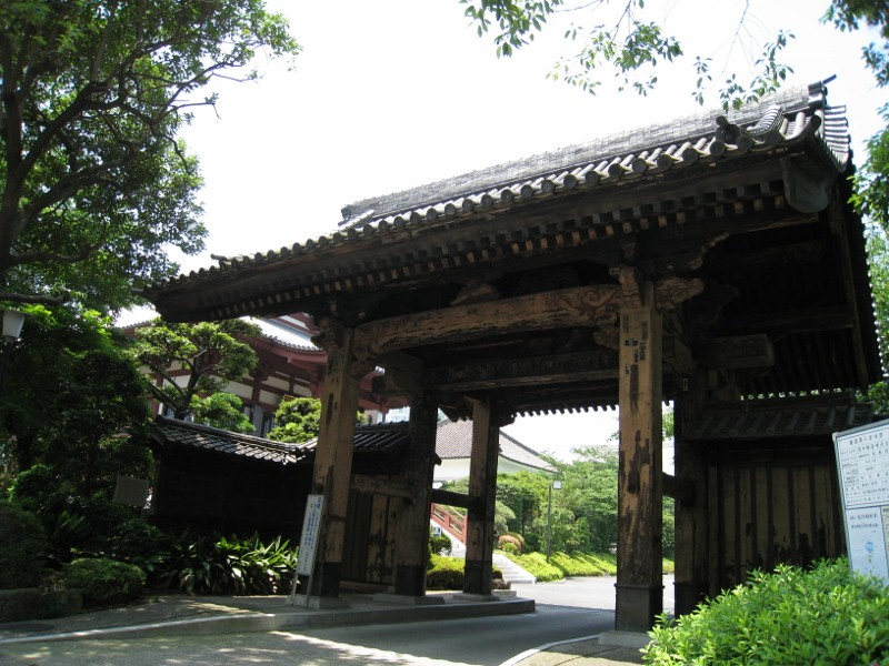 日本東京都增上寺黑門